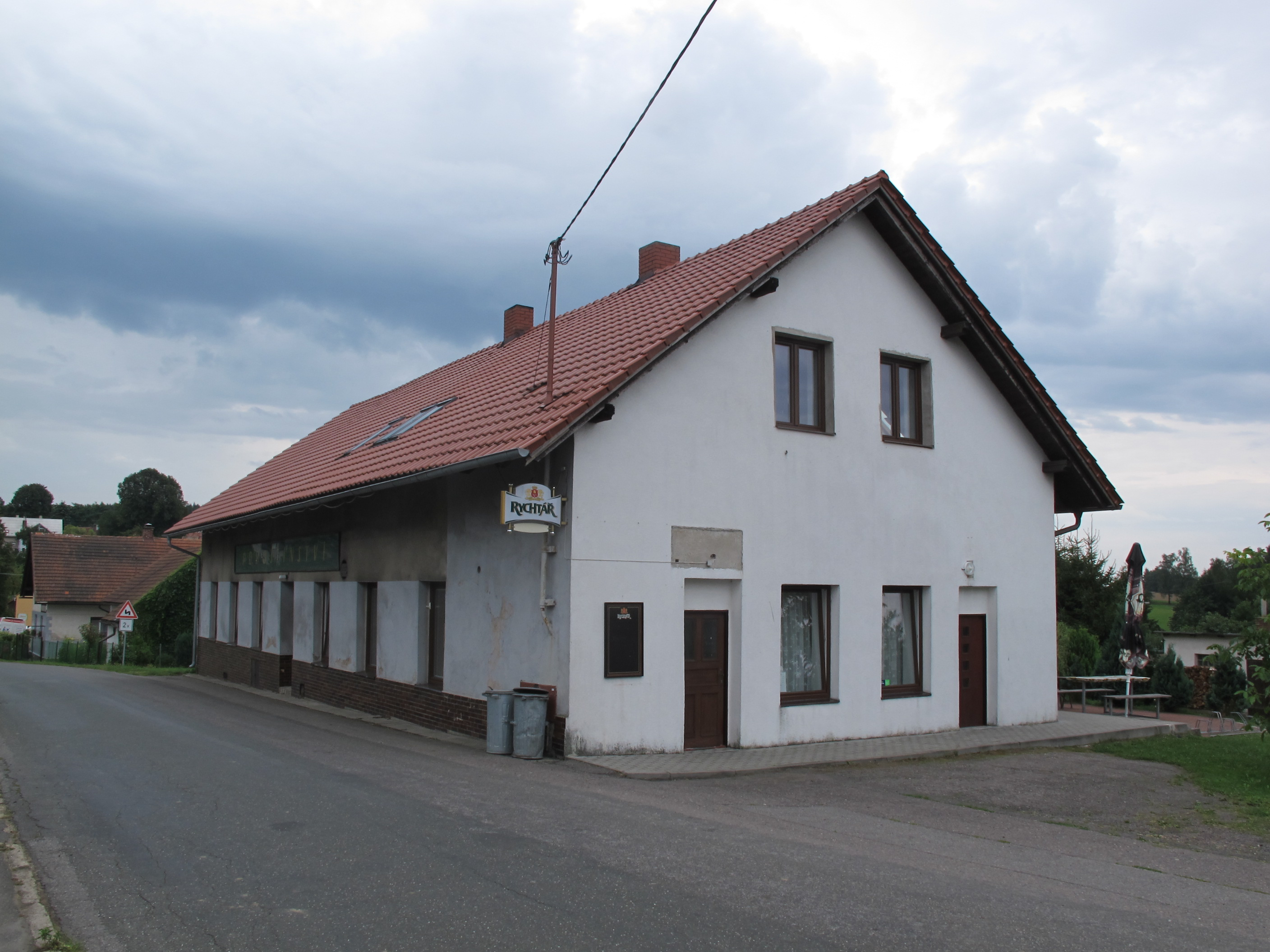 Rušinov.